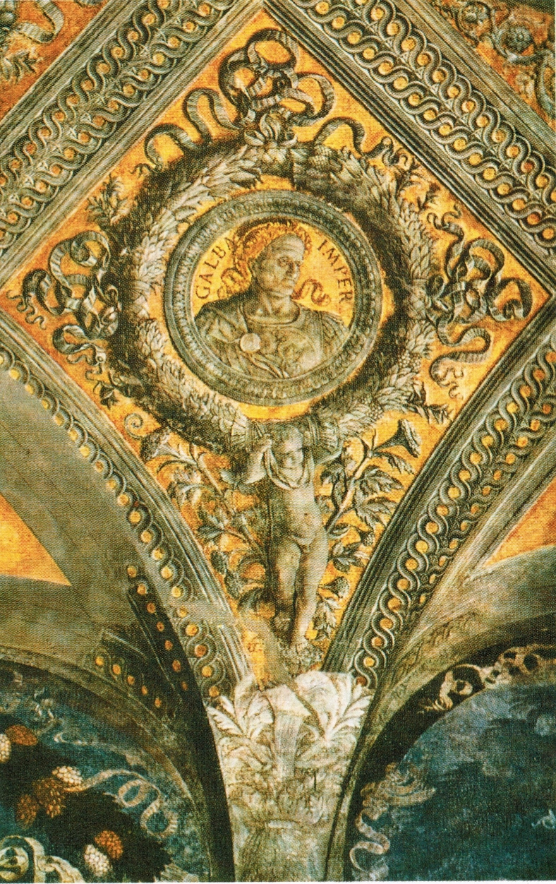 detail: Emperor Galba